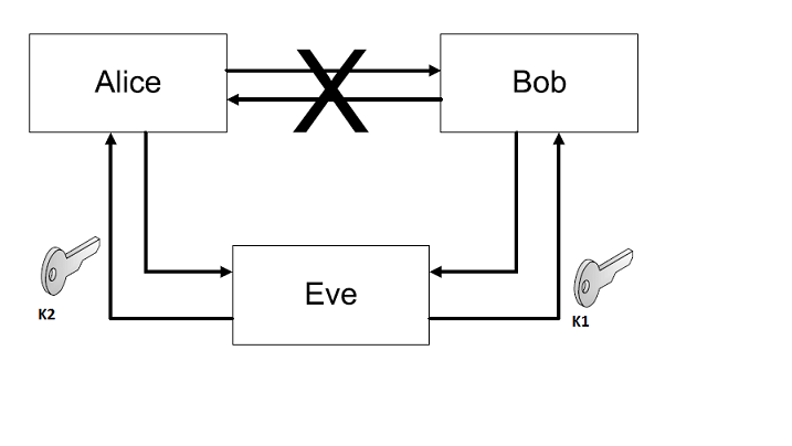 Problemi i Man in the Middle